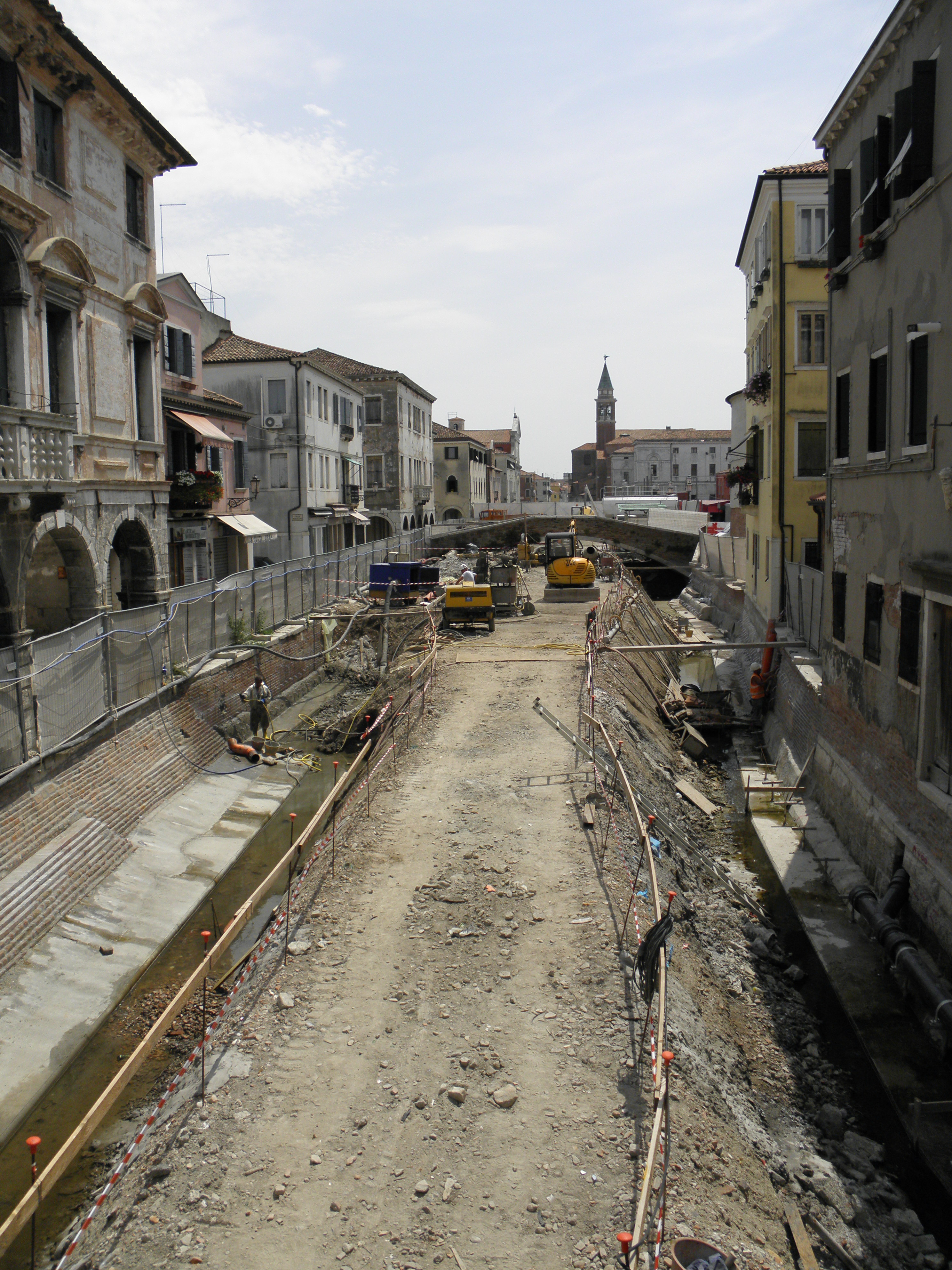 Chioggia: vista sul Canal Vena dal Ponte Caneva interrato per lavori di consolidamento delle rive.